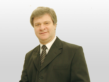 Osvaldo Principi comentarista deportivo especializado en boxeo. Sabias palabra